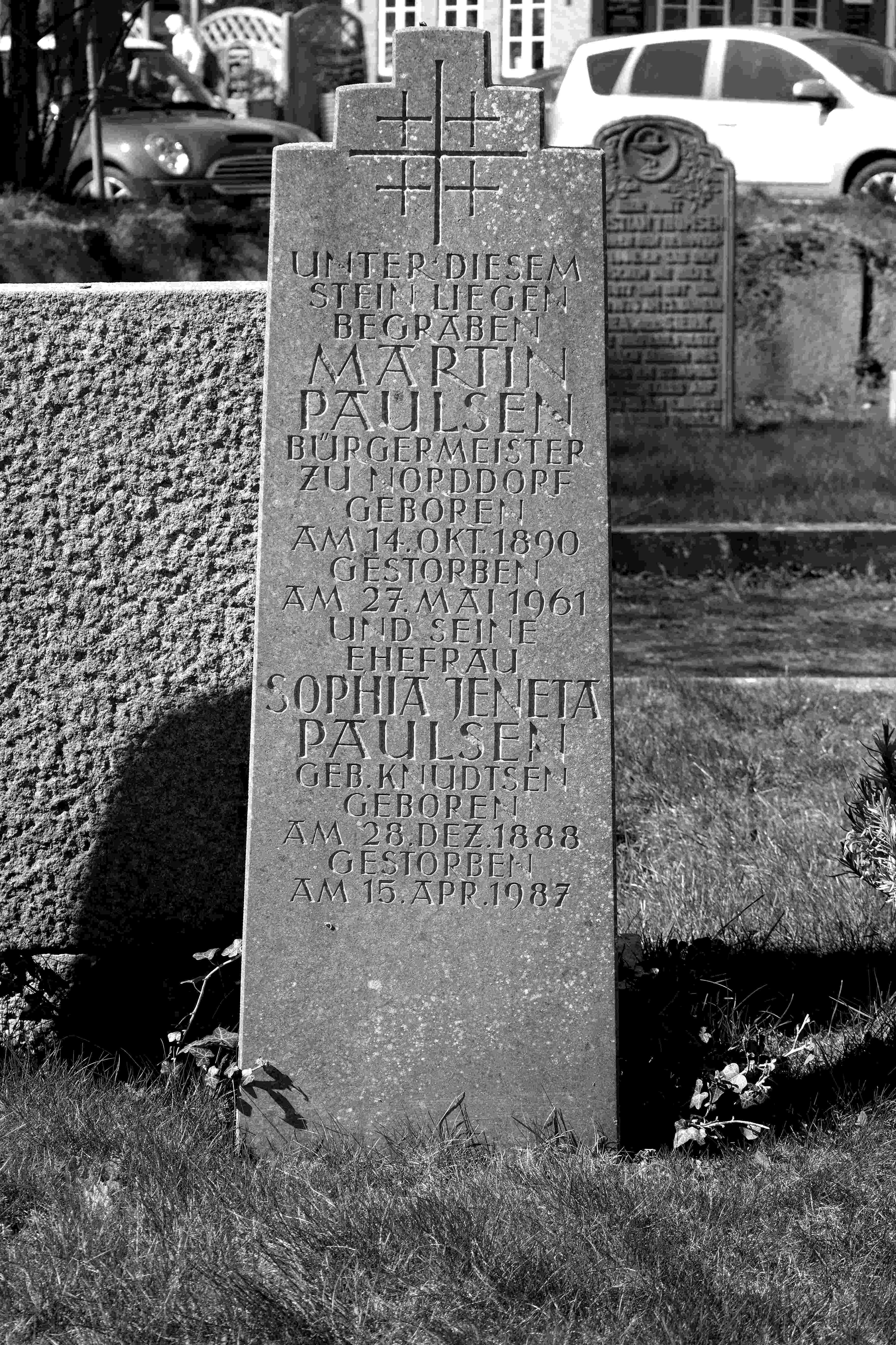 Werk von Ulrich Beier